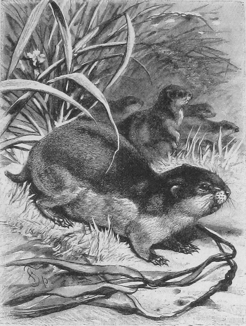 Lemmus lemmus par Friedrich Specht